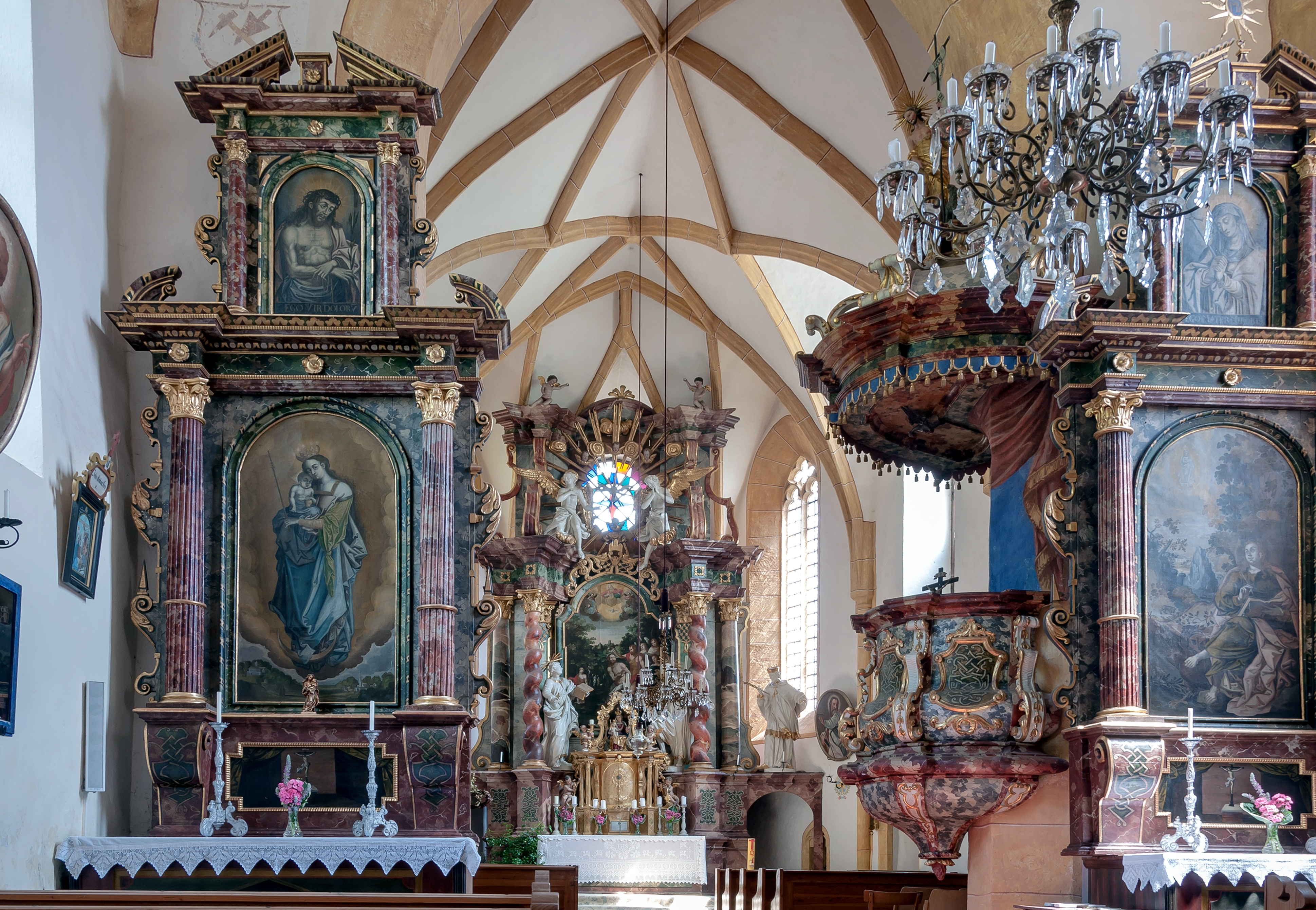 Kath. Filialkirche hl. Johannes d. T. mit ummauertem Kirchhof